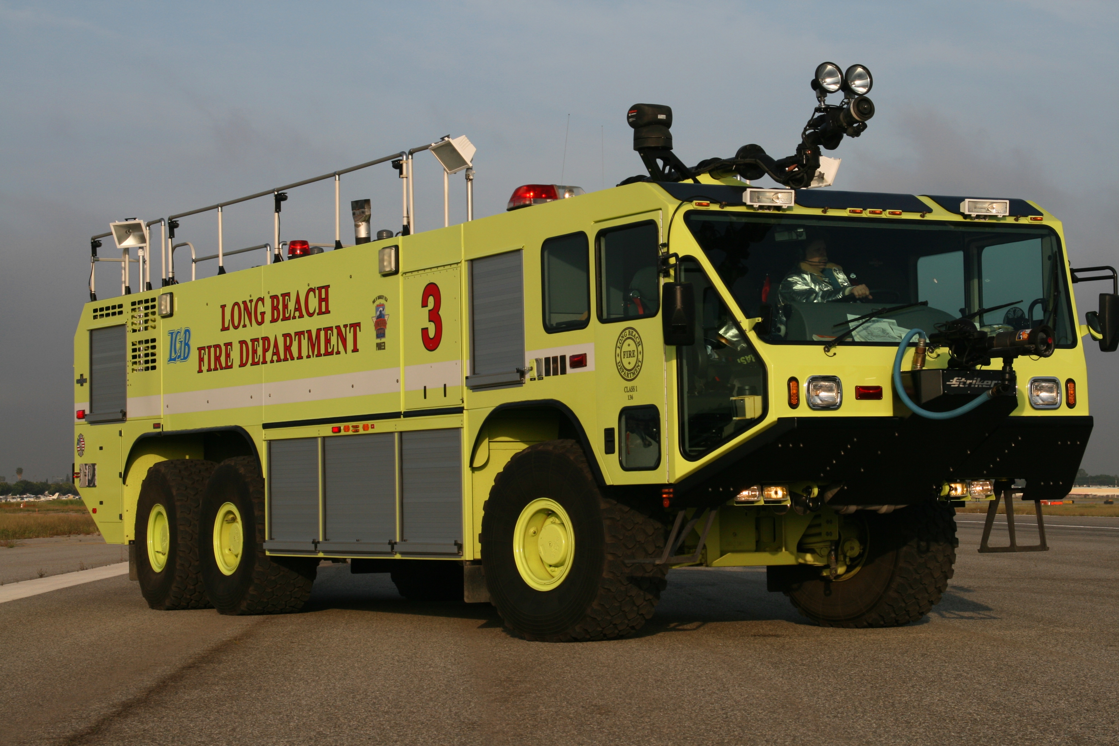 KLGB ARFF Rescue 3 responds to an incident.